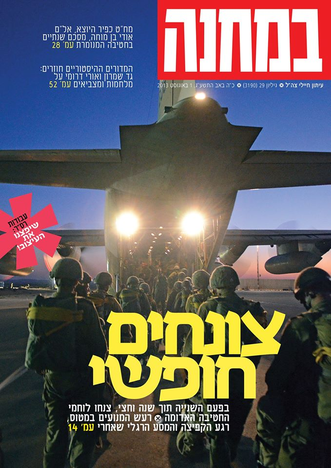 שער במחנה של גיליון 1 באוגוסט 2013